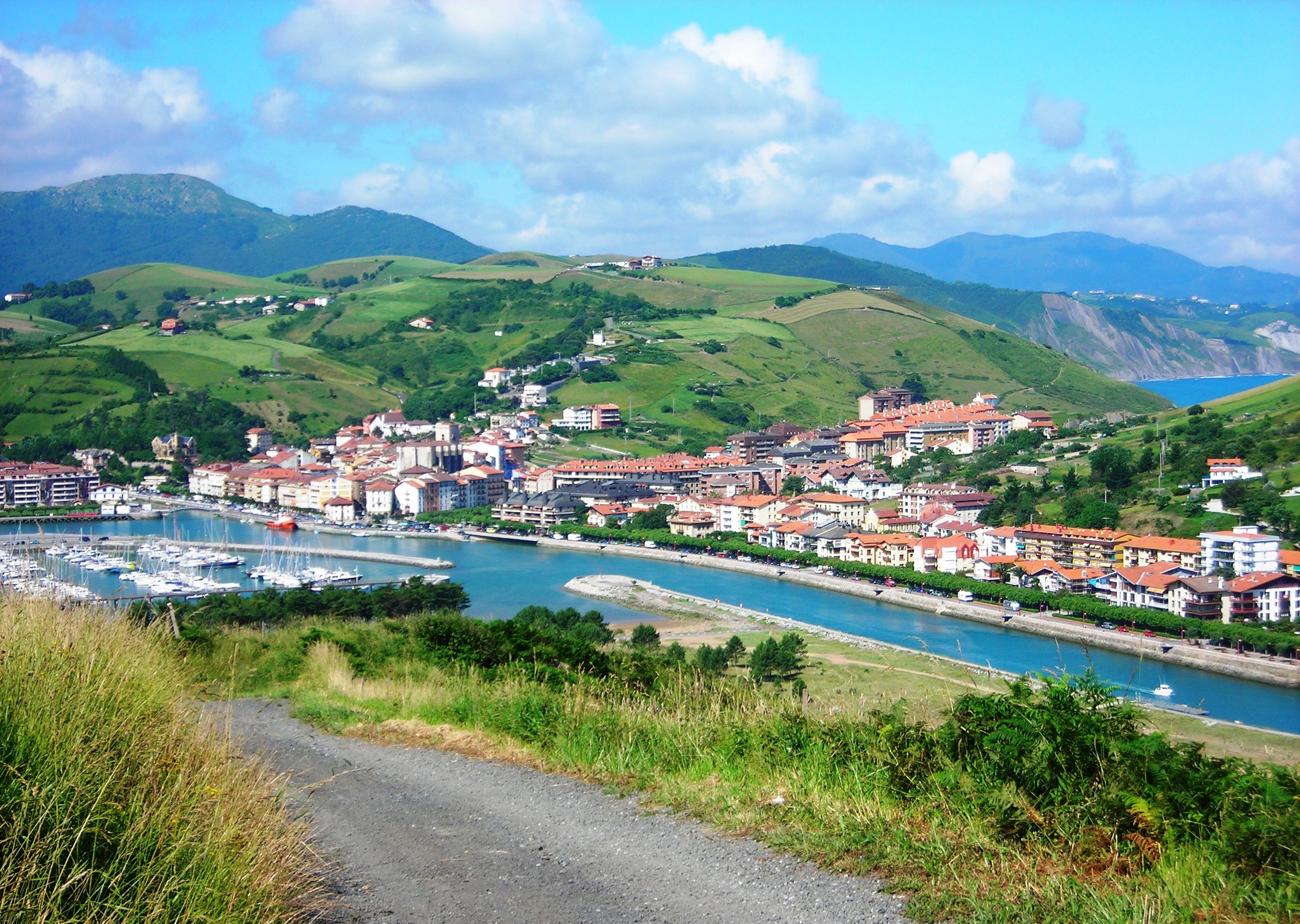 Zumaiaren ikuspegi orokorra.